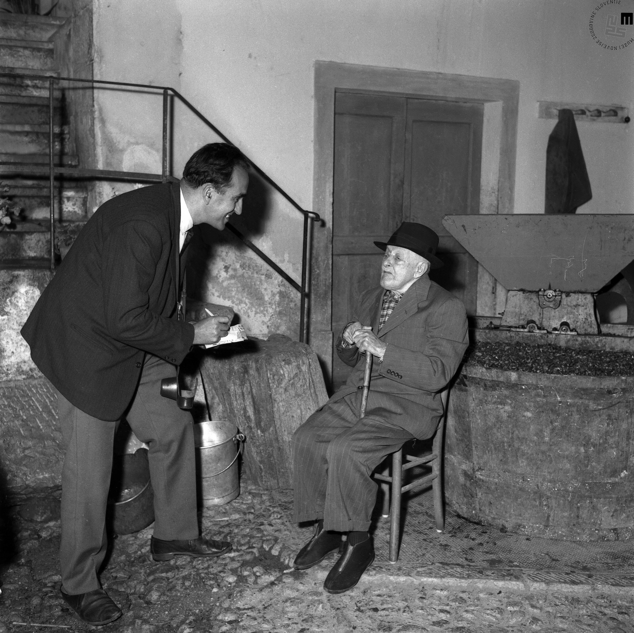 Edi Šelhaus intervjuva najstarejšega Slovenca, 106-letnega Jožeta – Bepa Jusiča iz Beneške Slovenije, v gorski vasi Klenje pri Čedadu.